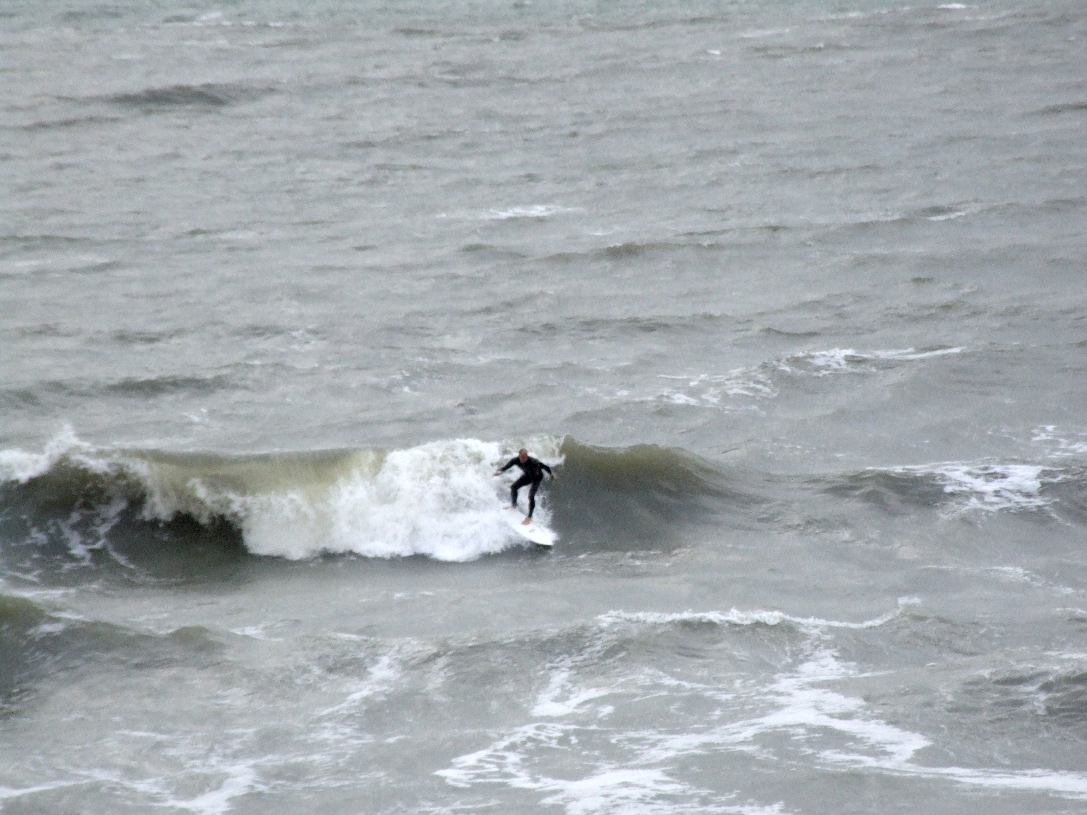 Surfen vor Kijkduin (Strand bei Den Haag) NL Mitte November 2006 bei +/- 7 Grad.